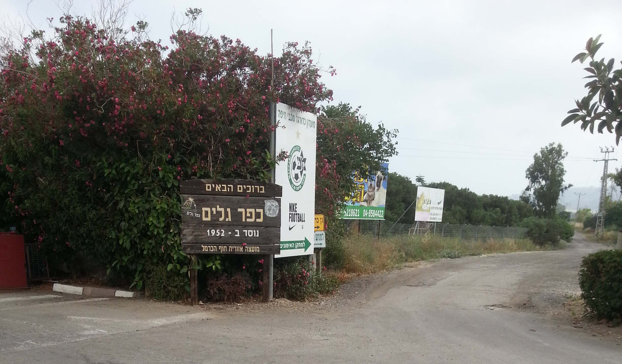 כפר גלים, כביש הכניסה.